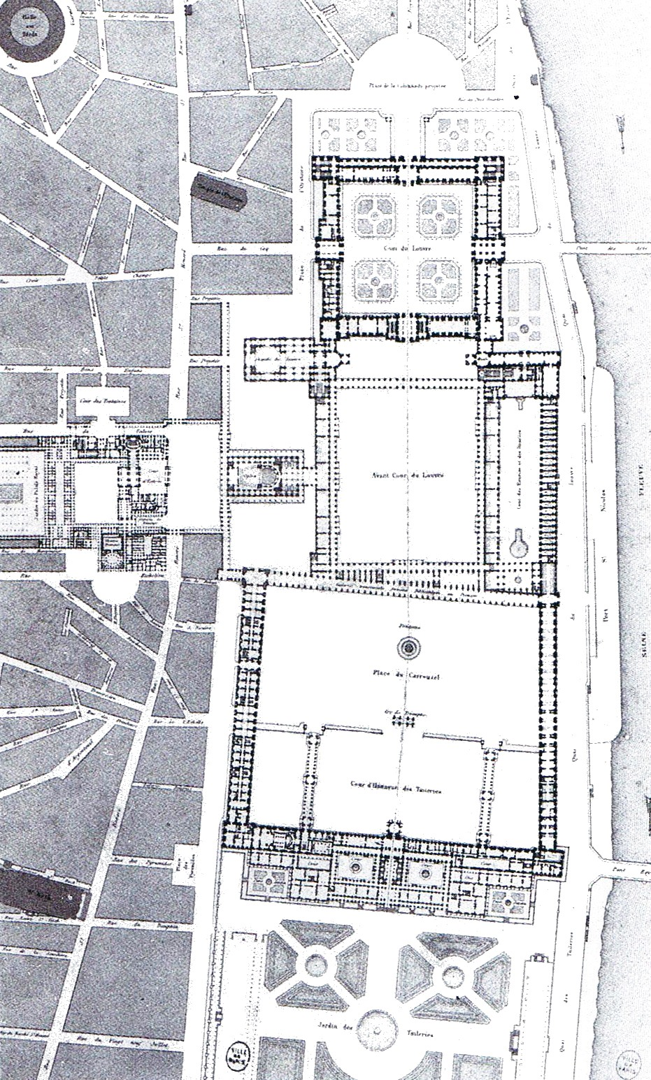 Plan du projet de réunion du Louvre et des Tuileries (projet soumis à Louis-Philippe, reprenant celui présenté à Napoléon Ier)